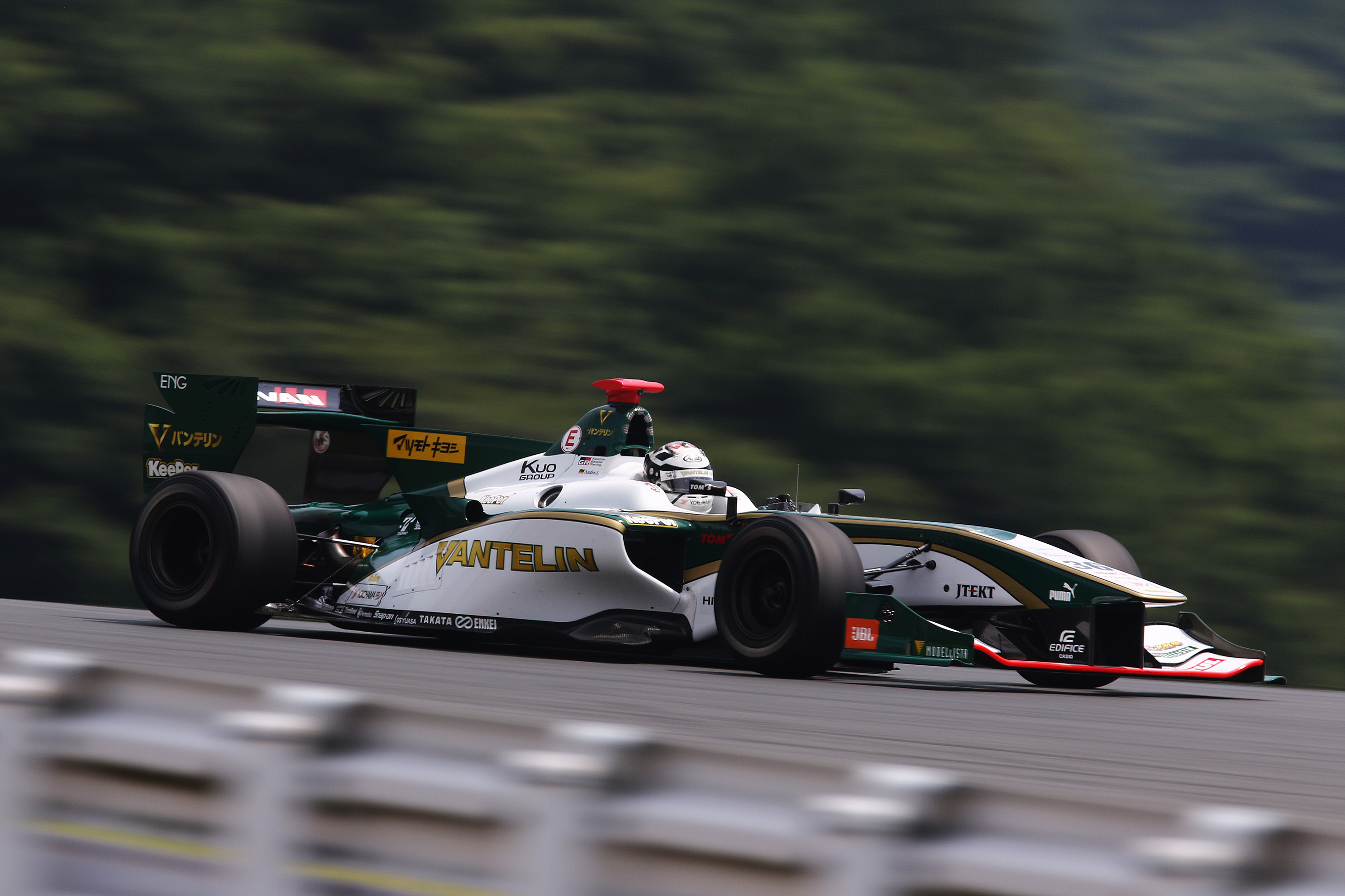 2017.07.09 SUPER FORMULA Rd.3 Fuji Speedway VANTELIN TEAM TOM’S 36 アンドレ・ロッテラー [7D2_9392ks]